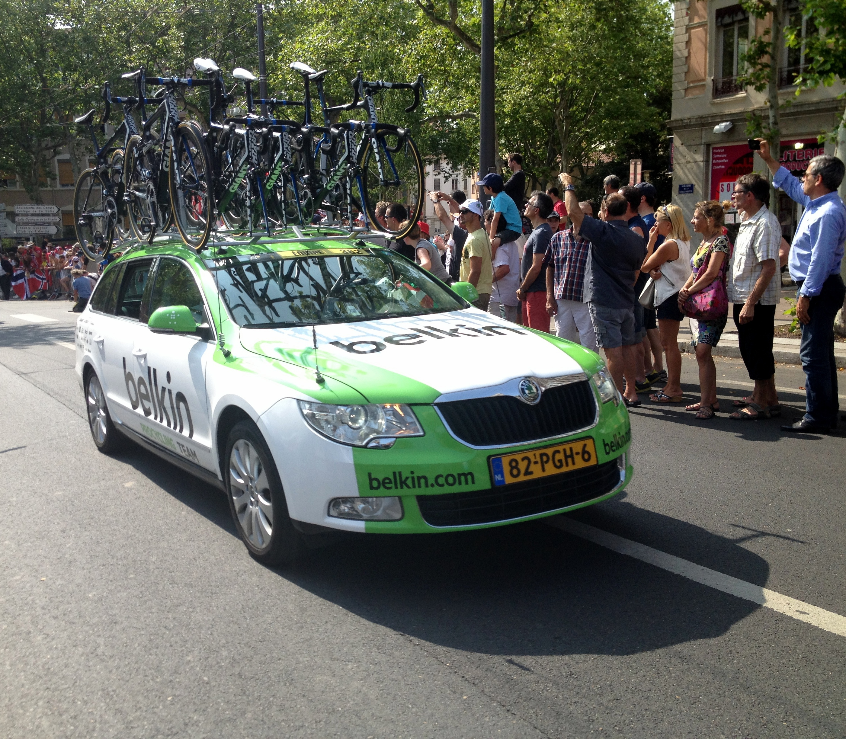 Etape 14 du Tour de France 2013.